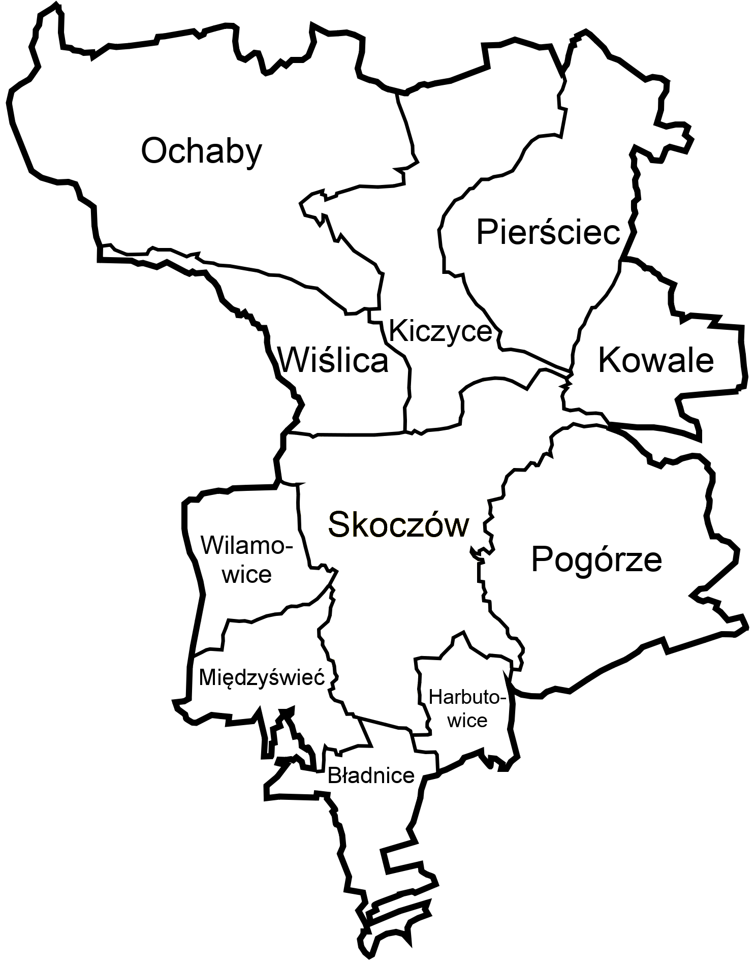 Miasto i sołectwa gminy Skoczów